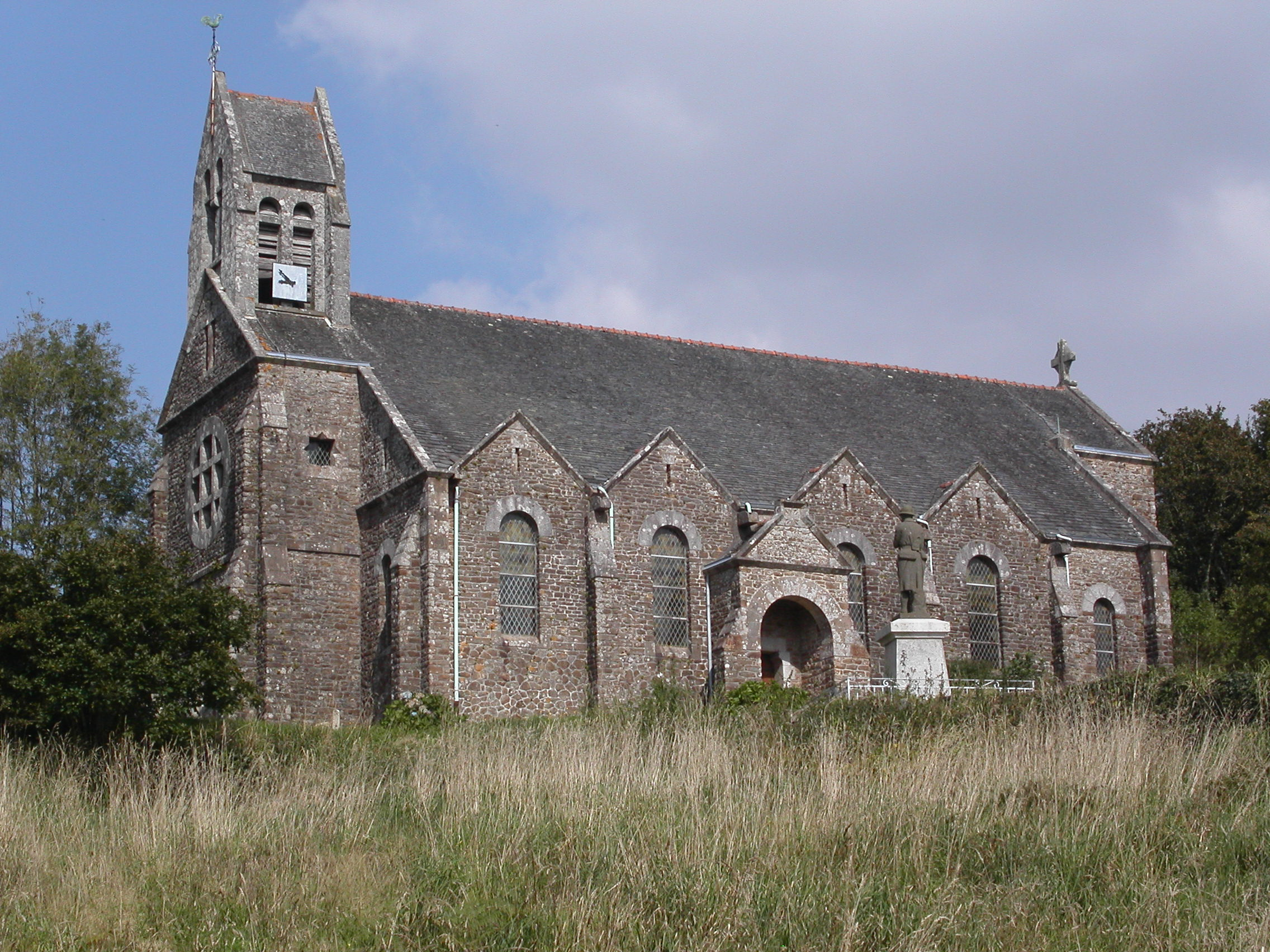 07.Eglise actuelle de Botmeur construite en 1909 par l'architecte Charles Chaussepied, mais restaurée en 1935 après un incendie.